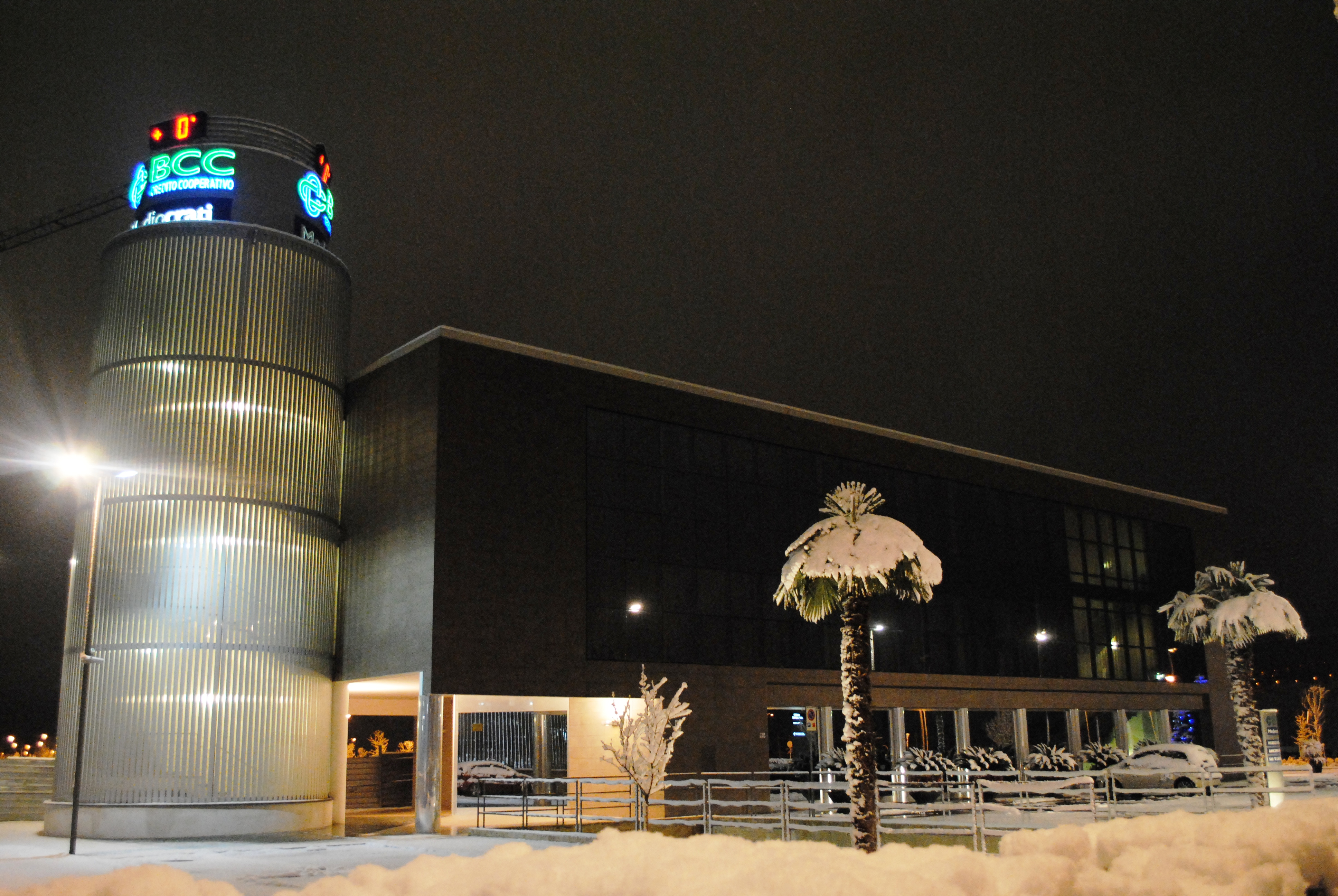 Centro direzionale Banca di Credito Cooperativo Mediocrati